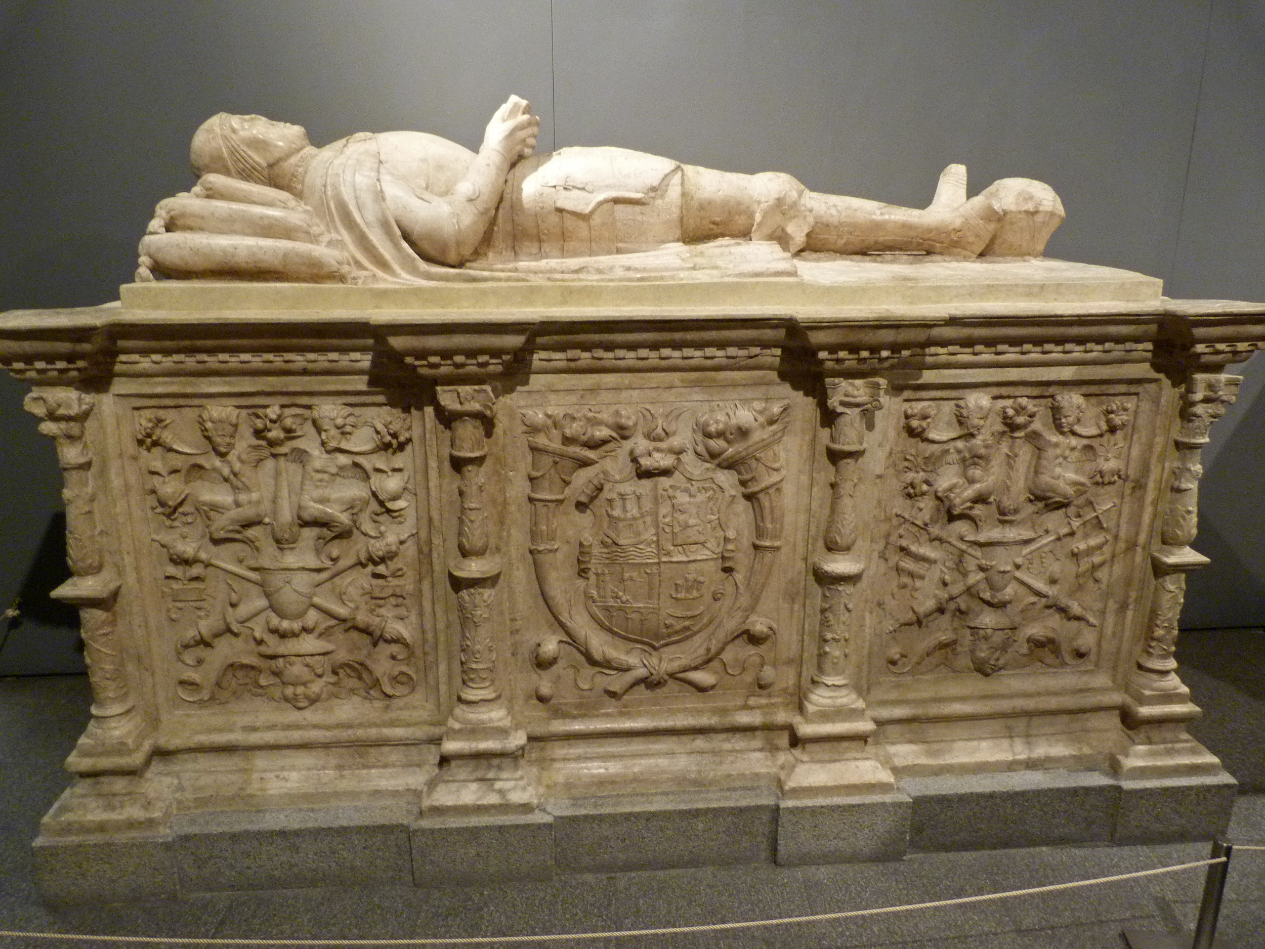 Monumento funerario renacentista a Francisco Ramírez de Madrid, realizado hacia 1531 que se conserva junto al de su esposa Beatriz Galindo en el Museo de los Orígenes de Madrid.